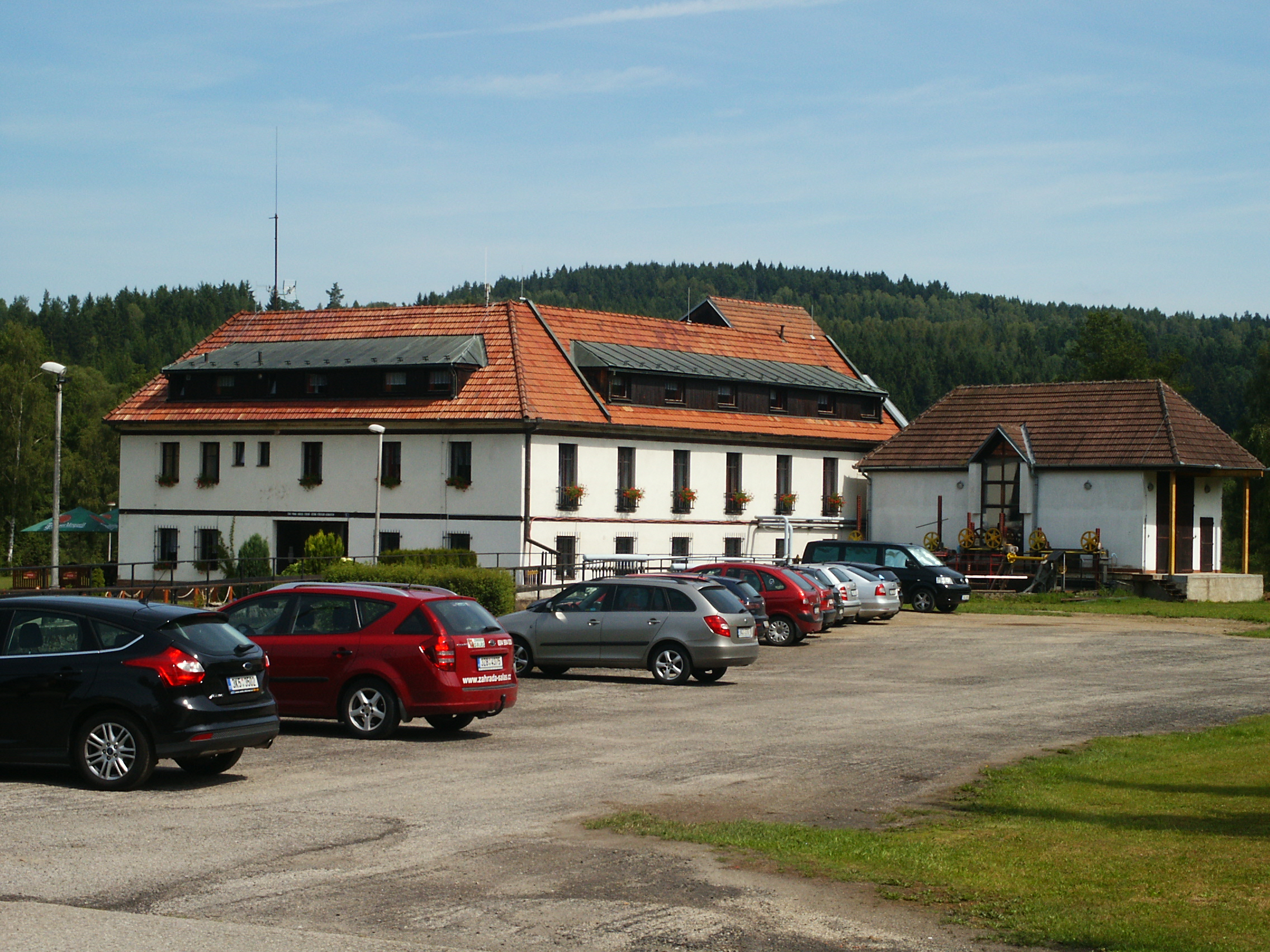 Herbertov - Horní Mlýn č.p.15 (penzion a středisko ČVUT)